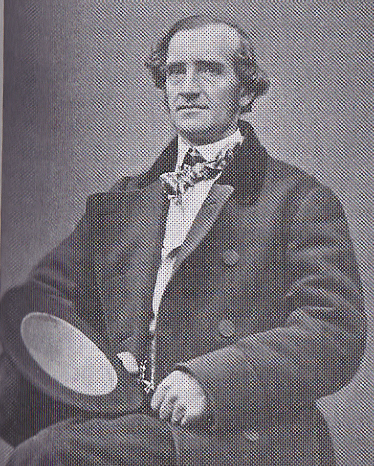 Läkaren och kokboksförfattaren Charles Emil Hagdahl